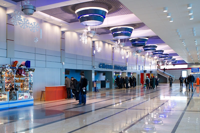 Терминал Омского аэропорта зона регистрации